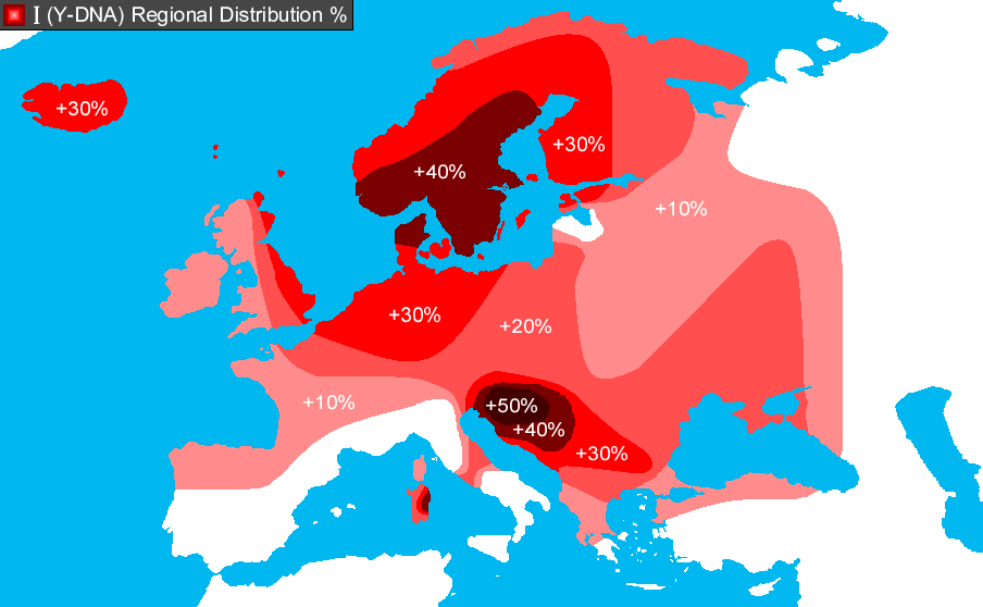 I (y-dna) distribution Europe